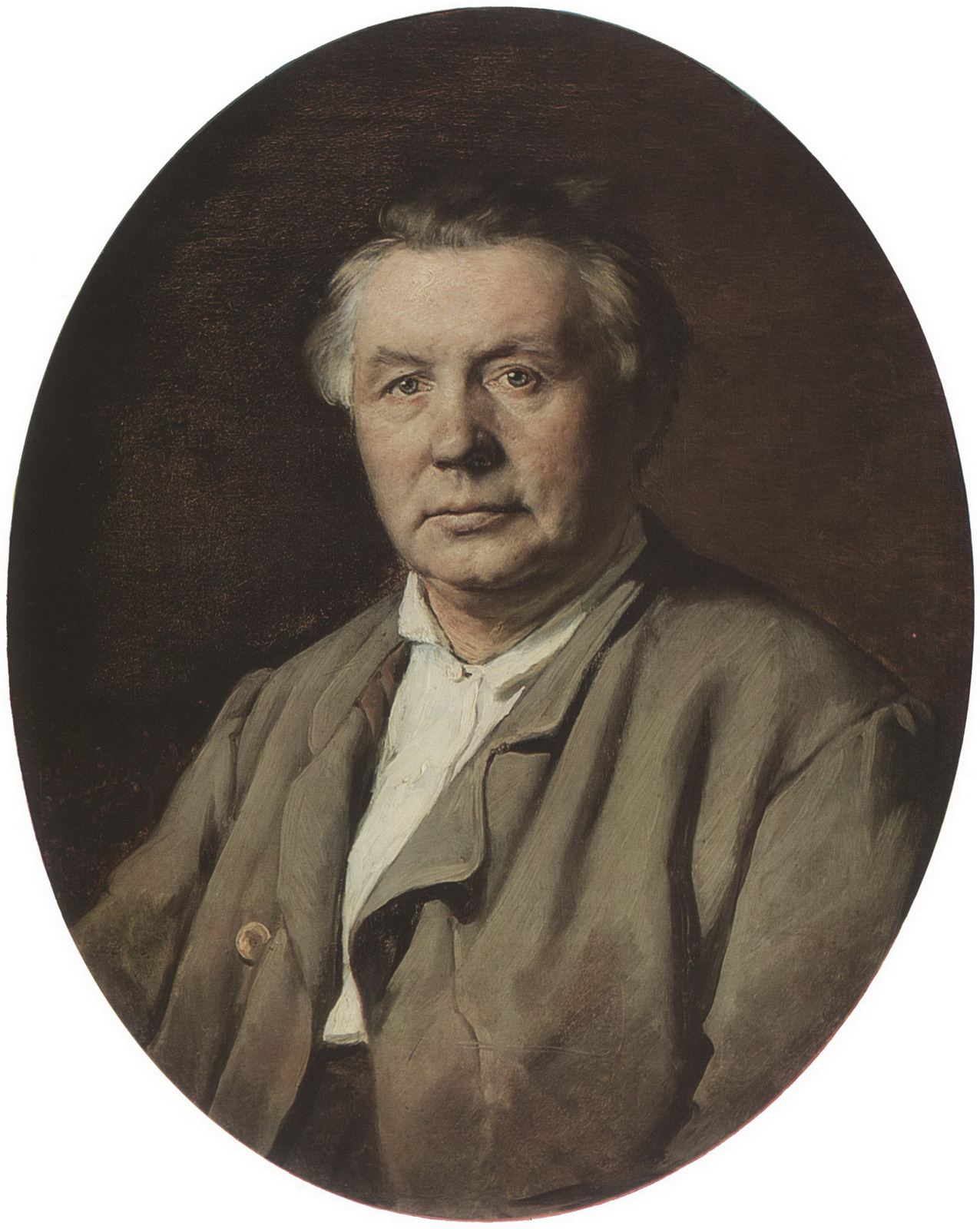 Портрет неизвестного